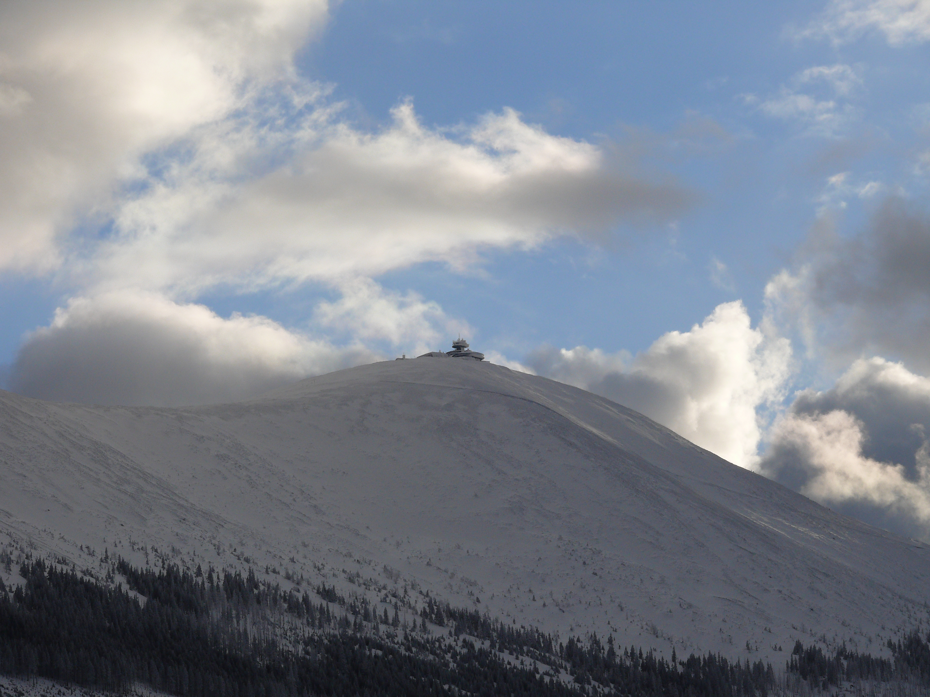 Śnieżka, a view from Karpacz's Krucze Skały